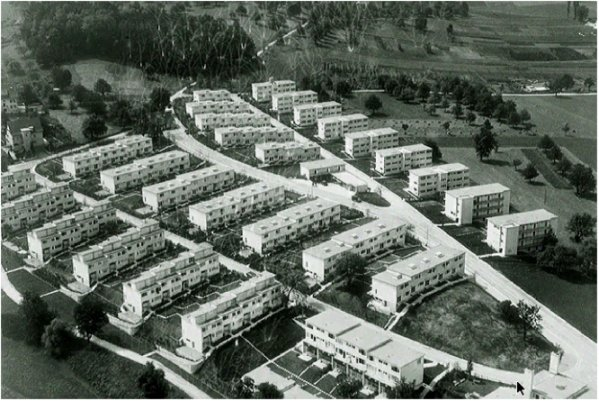 Die Siedlung Neubühl 1932